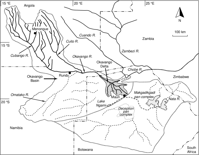 Bacia hidrográfica do Calaári, com base em definições da United Nations Procurement Division (UNPD).